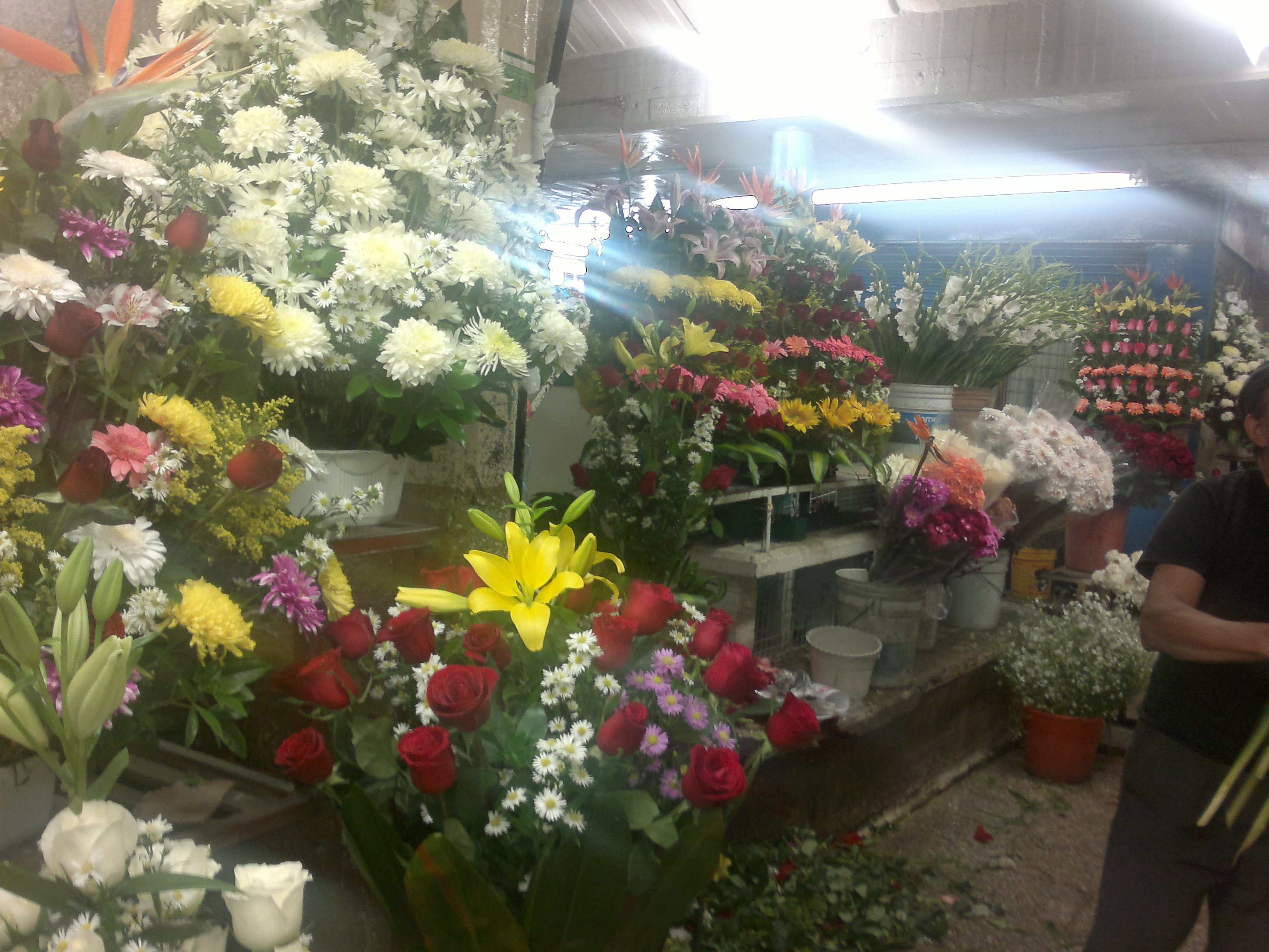 Dentro de los mercados existen varias secciones enfocadas a un giro en especifico, entre ellas las florerías.